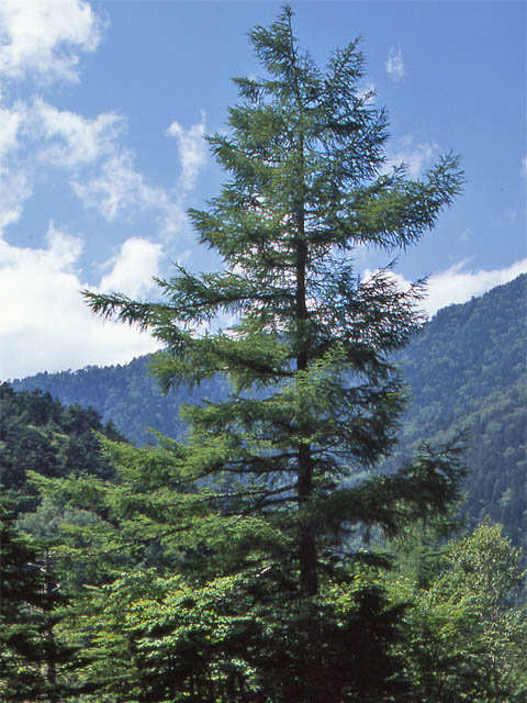 Larix leptolepis o Larix kaempferi en El paso de Kitazawa de Sierra Akaishi, Japon カラマツ、南アルプス北沢峠にて撮影